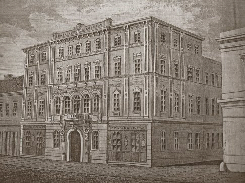 Redaktions- und Verlagsbüro sowie Druckerei der Illustrierten "Vasárnapi Ujság"